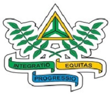 Bandeira e Brasão de Barra do Choça, Bahia